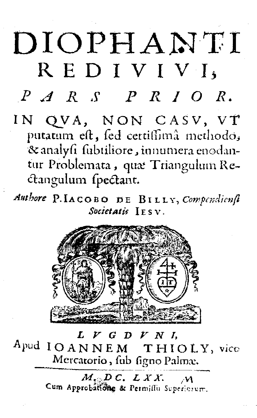 Frontespizio